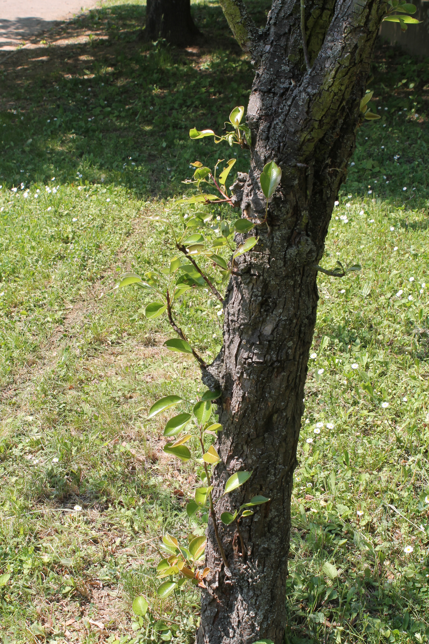 Hrušeň, letorosty na kmeni, Brno Komín